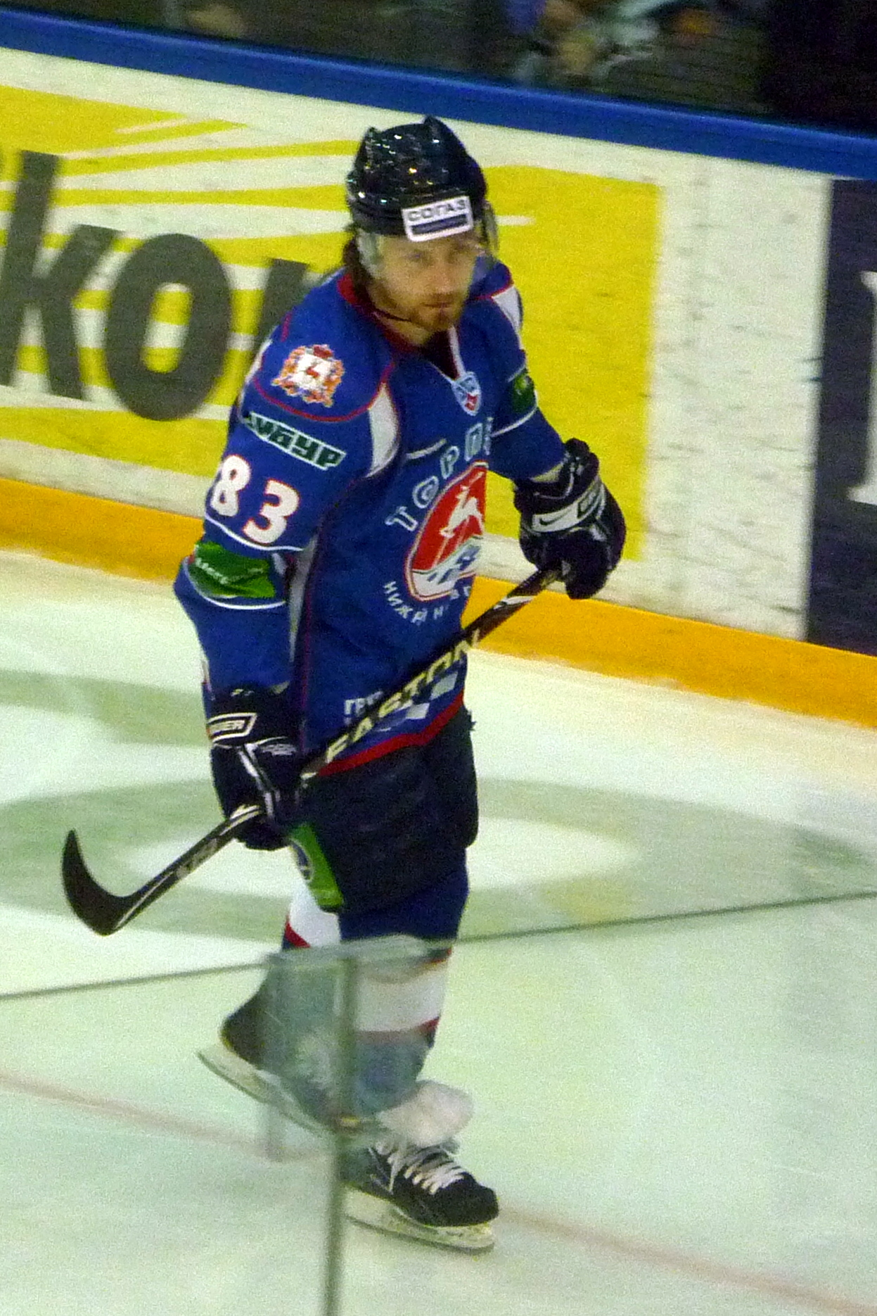 Нападающий нижегородского «Торпедо» Мэтт Эллисон в матче против питерского СКА 12 декабря 2010 года